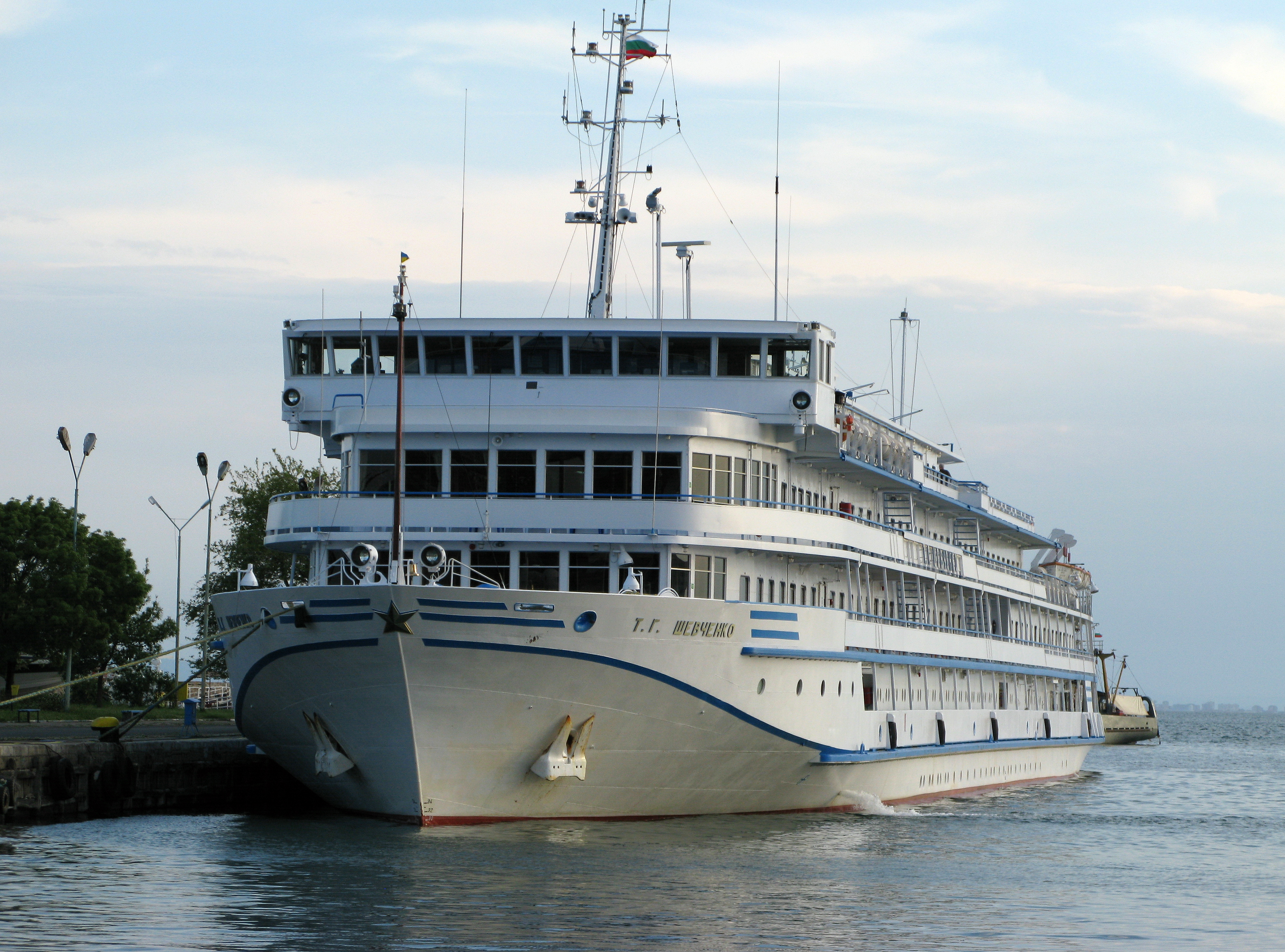 T. G. Shevchenko in Nessebar, Bulgarien